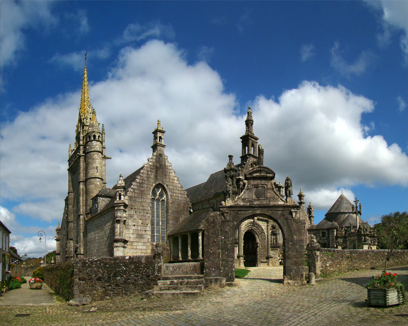 Enclos paroissial, Guimiliau, Finistère, Bretagne, France.